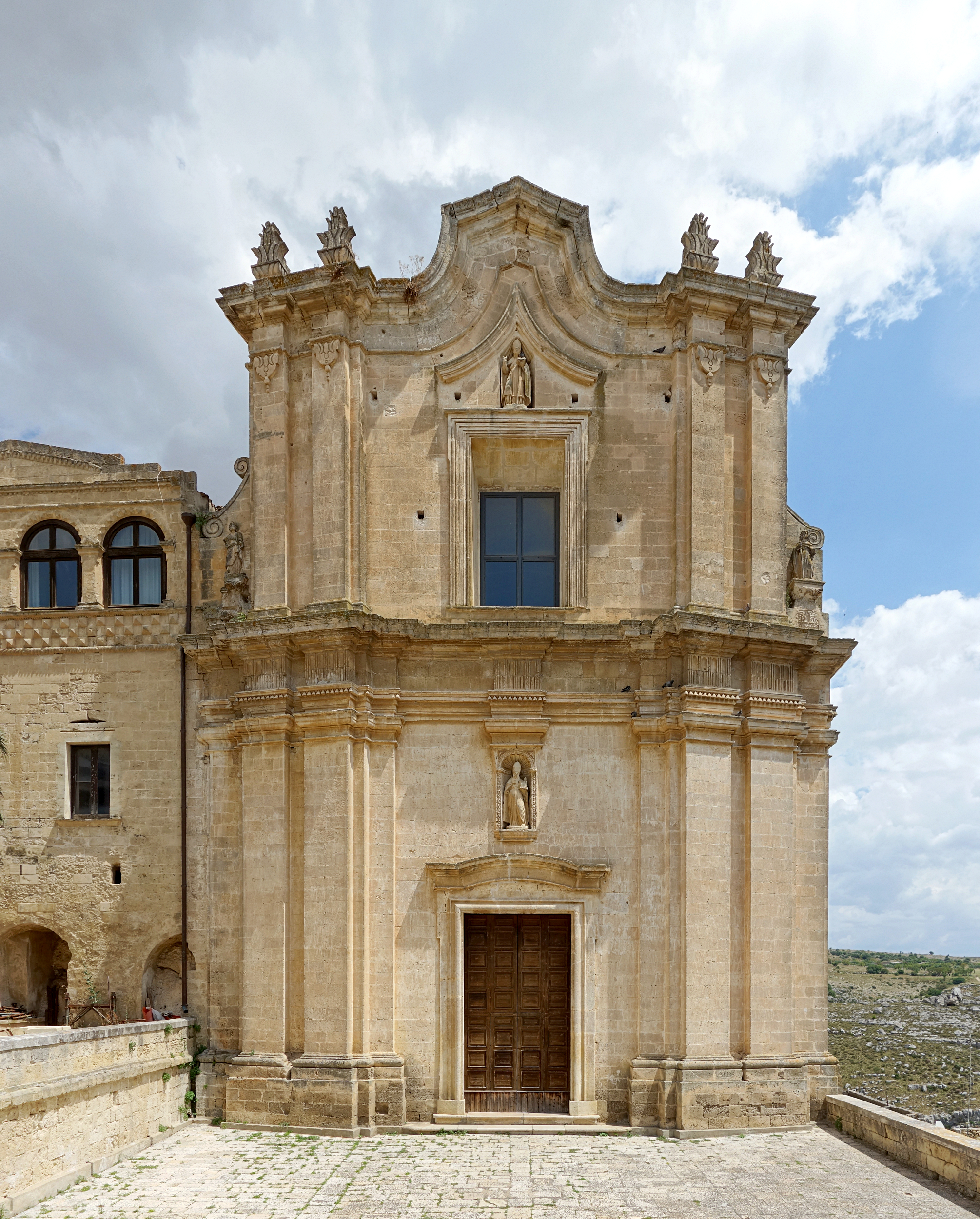 L'église Sant'Agostino à Matera.